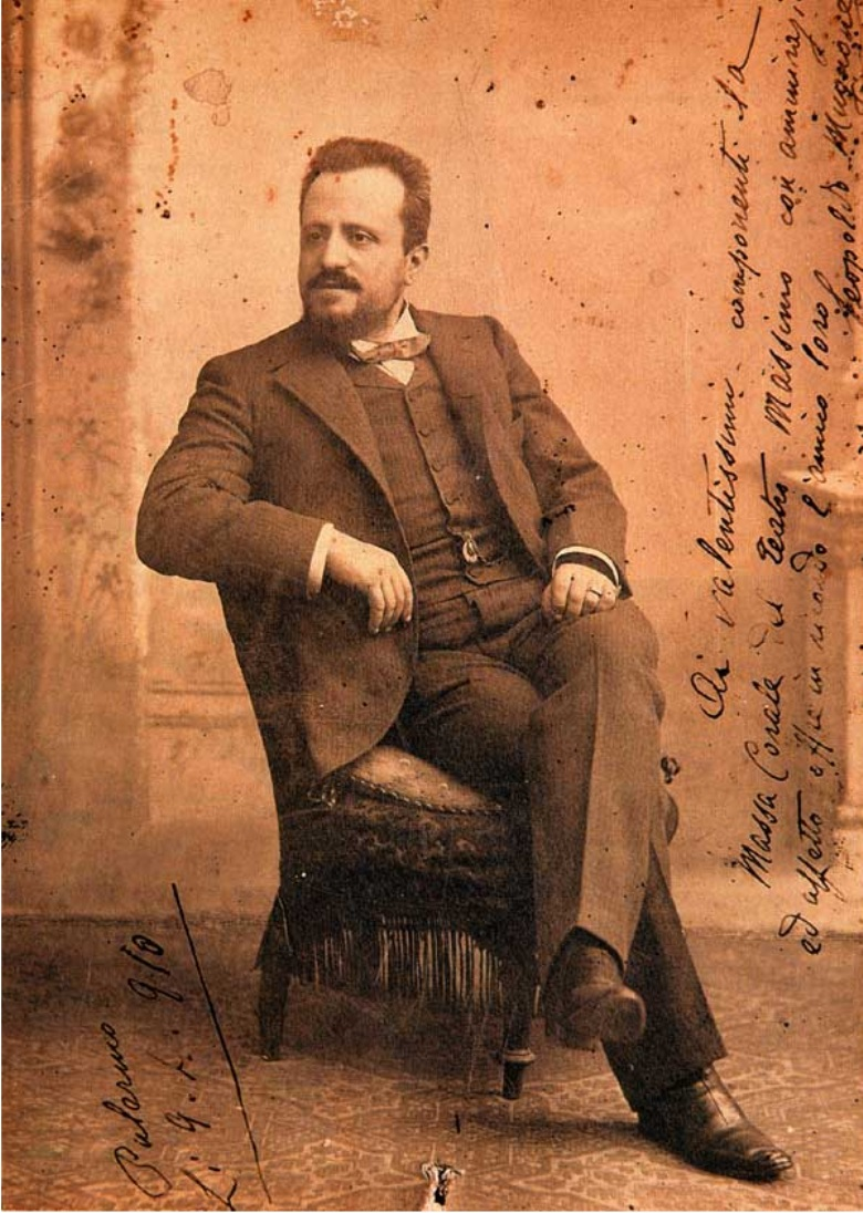 Il Direttore d'orchestra Leopoldo Mugnone, in una foto del 1910